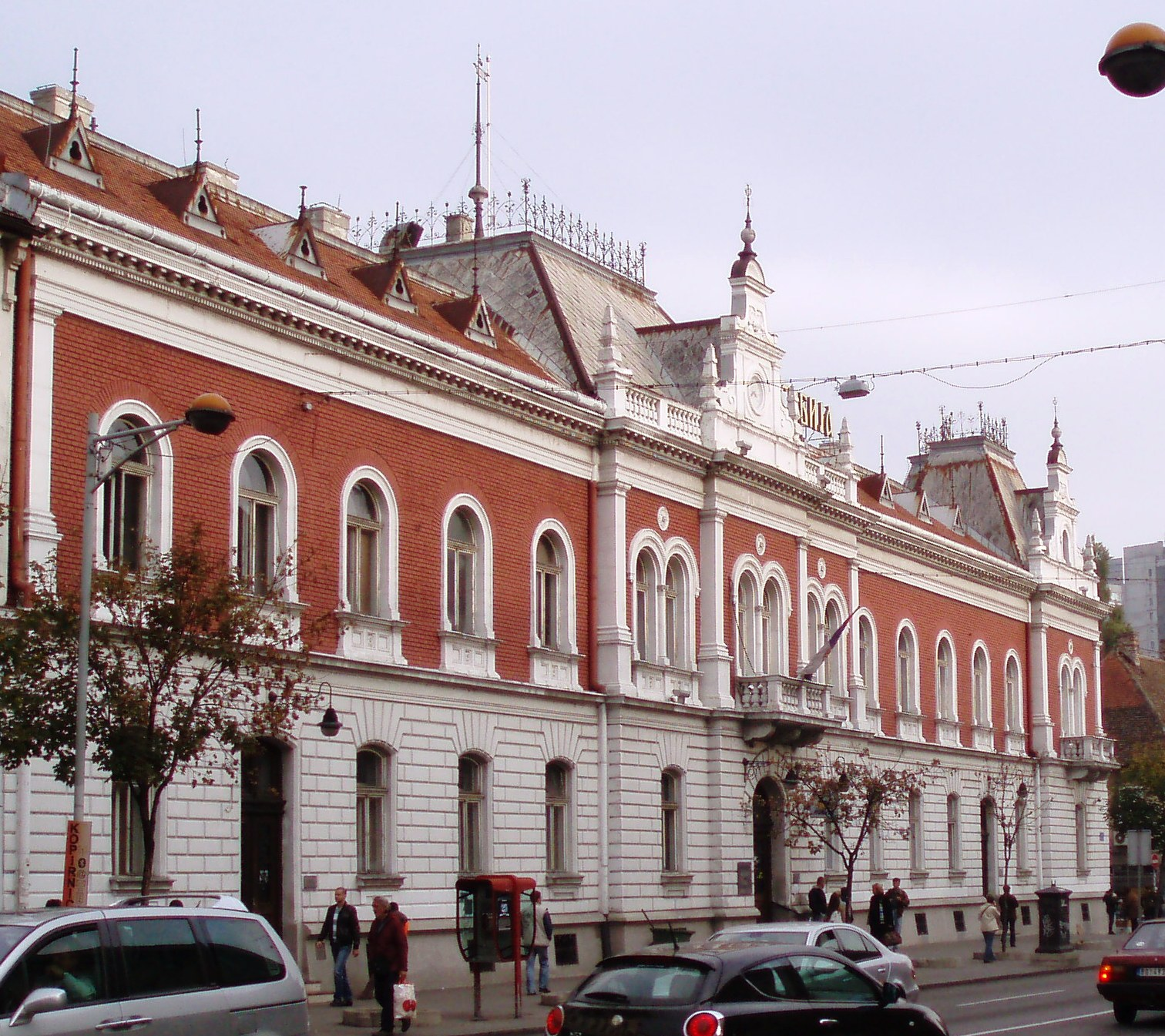 Zemunska pošta, autor fotografije: Nicolo